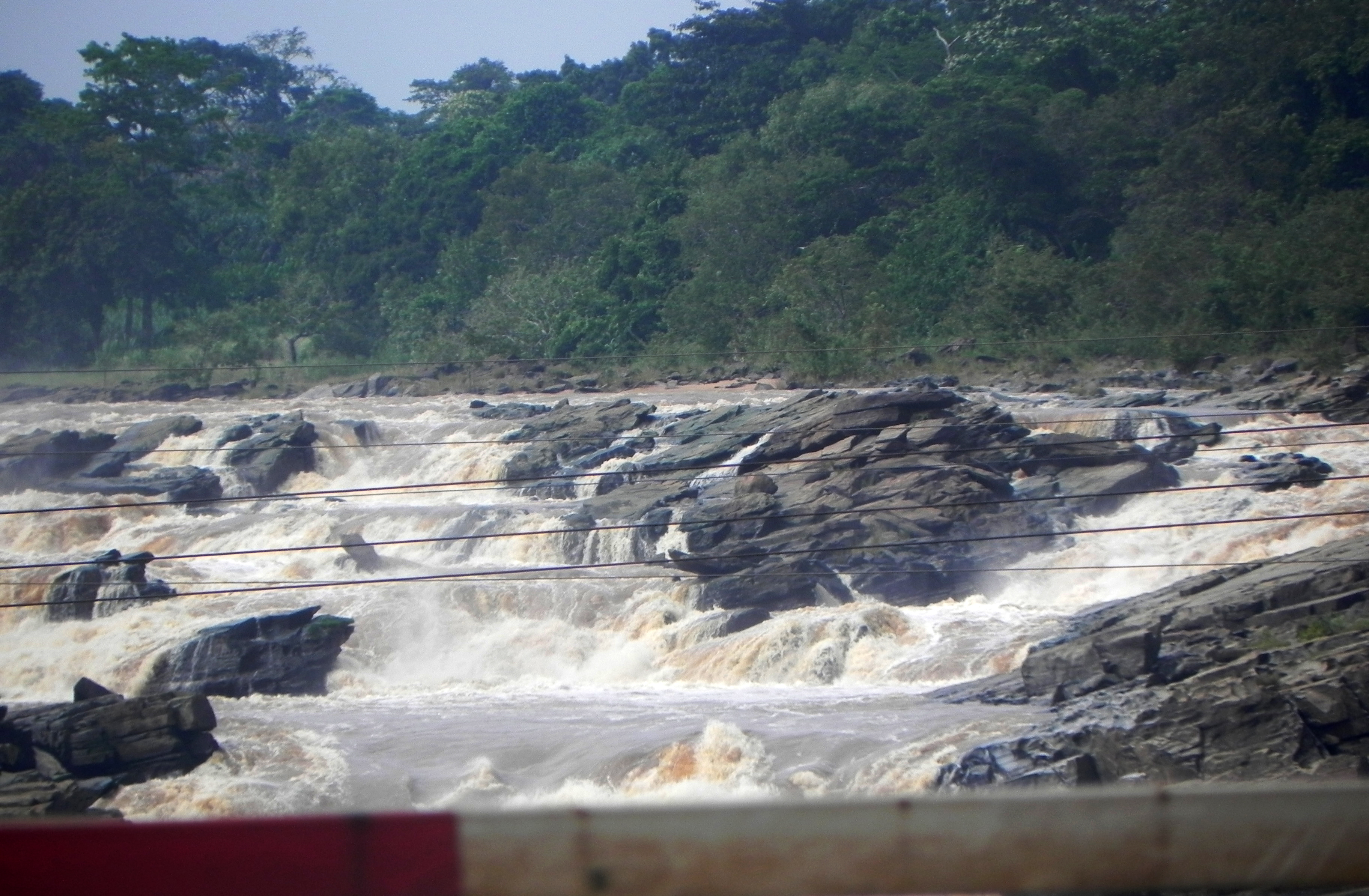 La rivière sanaga